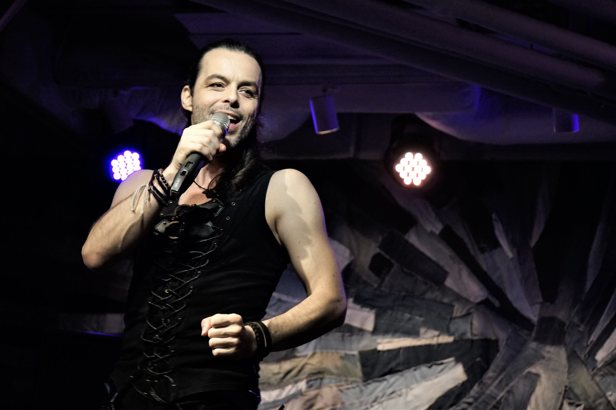 中文（台灣）: 更新Nuno resende近期照片(2019)